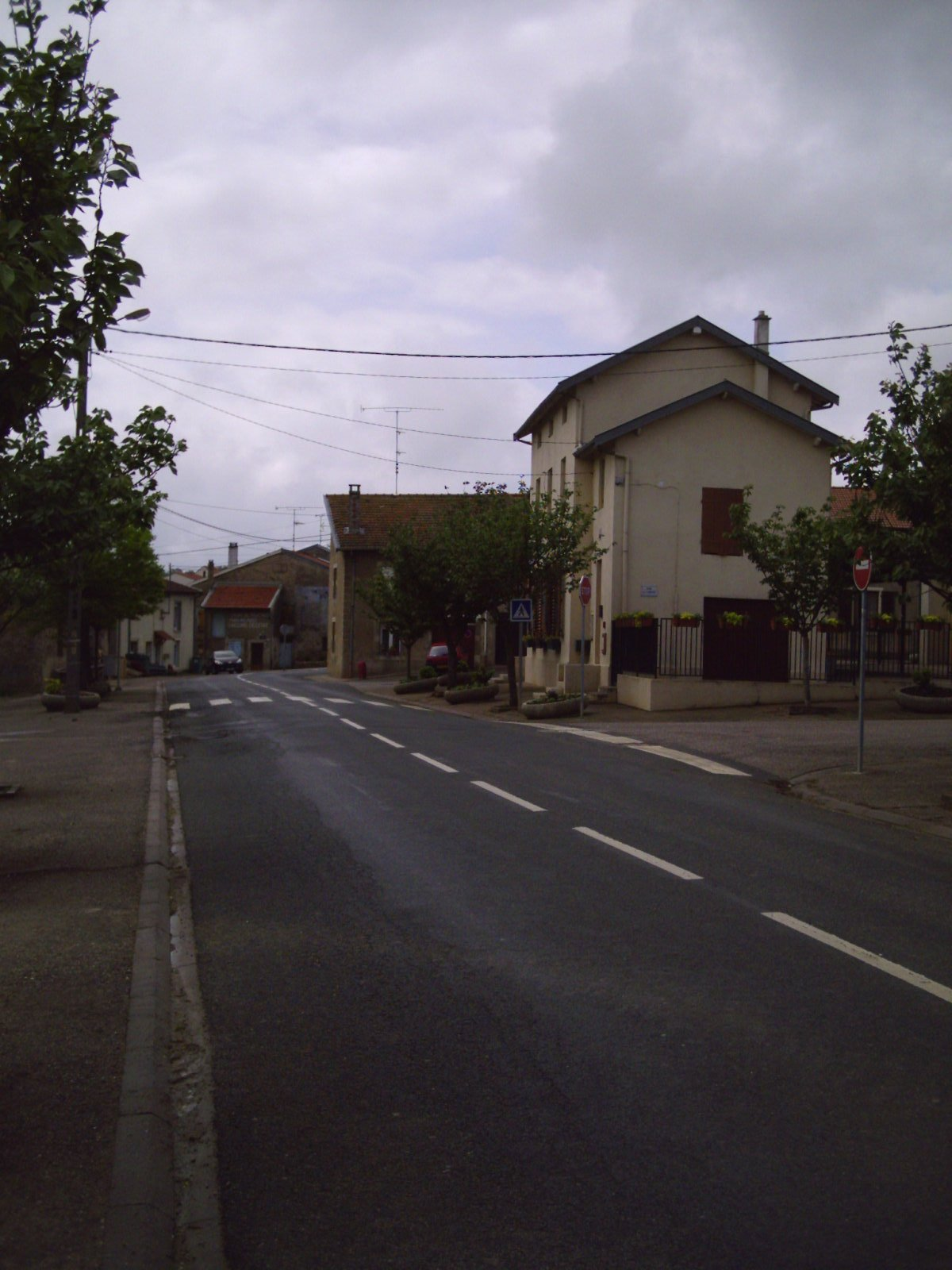 Cerville 54 - France